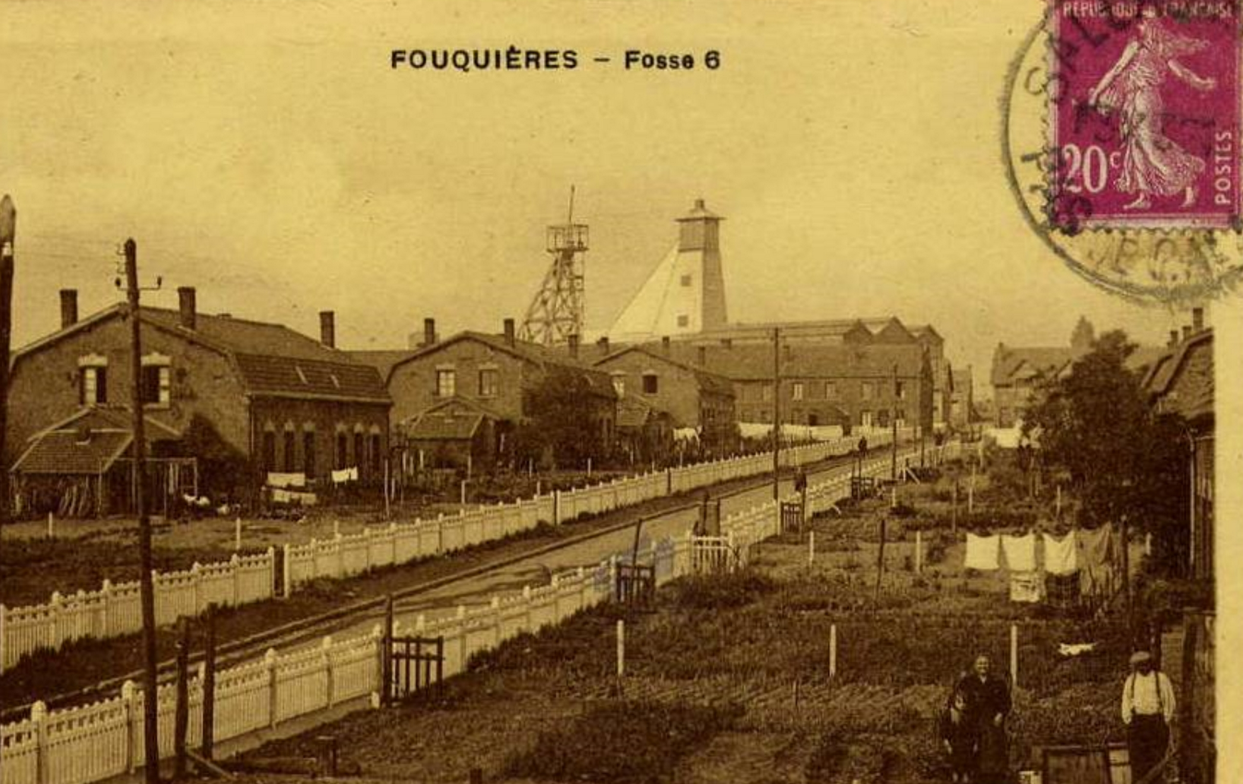 La Fosse n° 6 - 14 dite Alfred Dupont de la Compagnie des mines de Courrières était un charbonnage constitué de deux puits situé à Fouquières-lez-Lens, Pas-de-Calais, Nord-Pas-de-Calais, France.